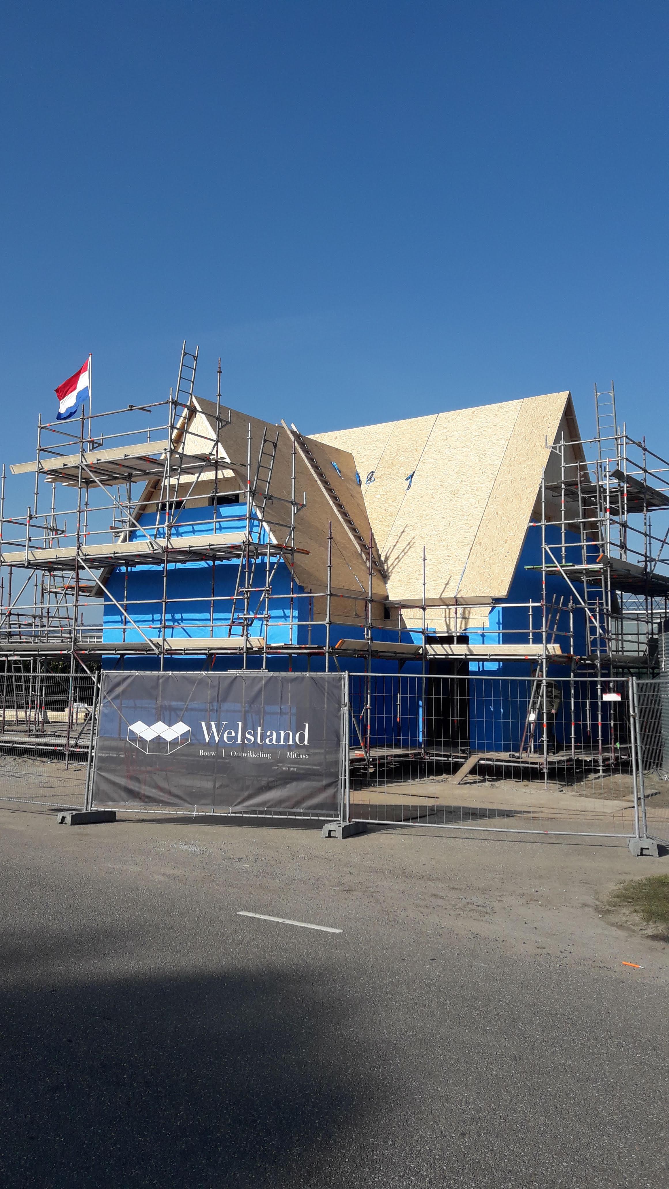 Woning opgebouwd uit SIP bouwsysteem.